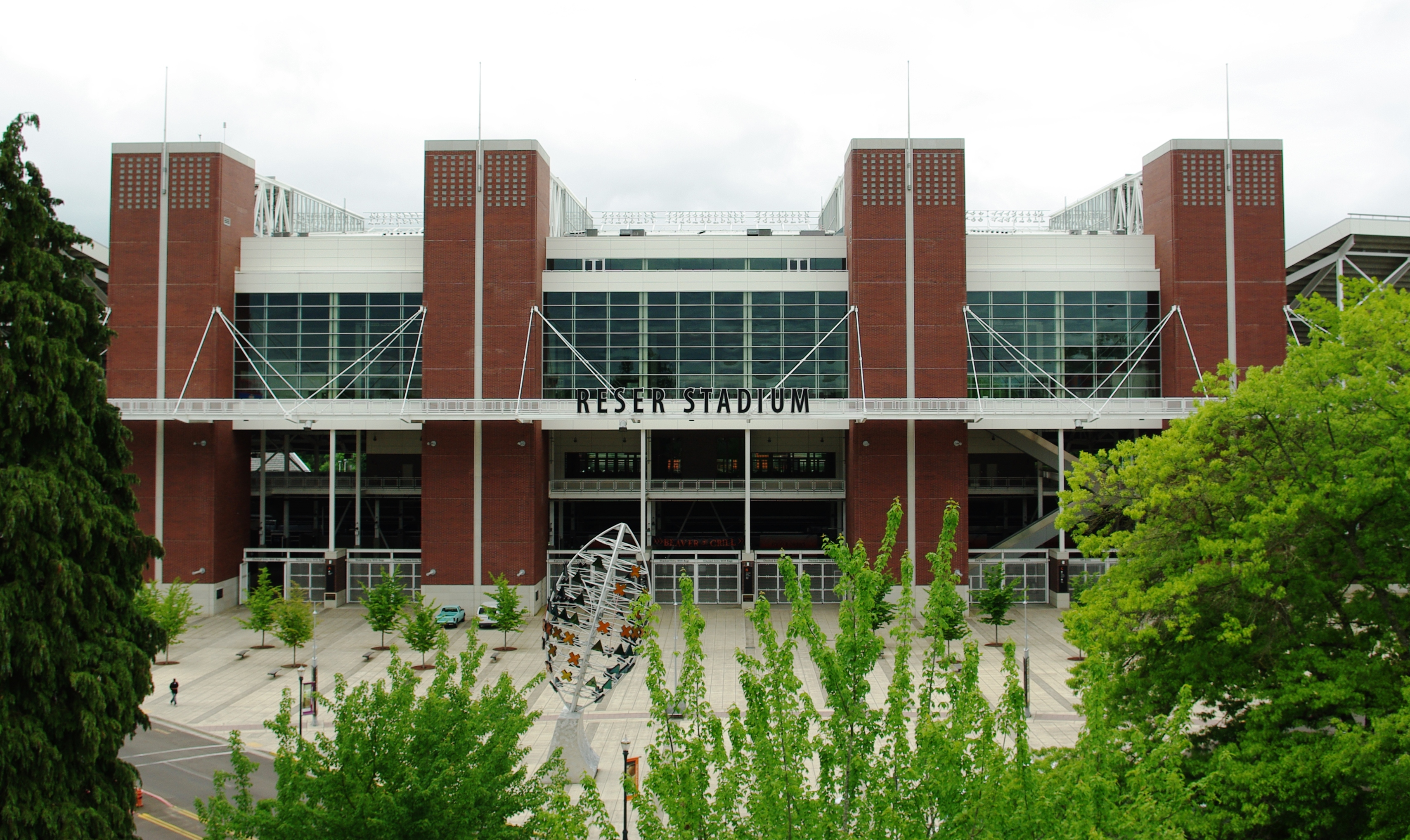 Reser Stadium entrance